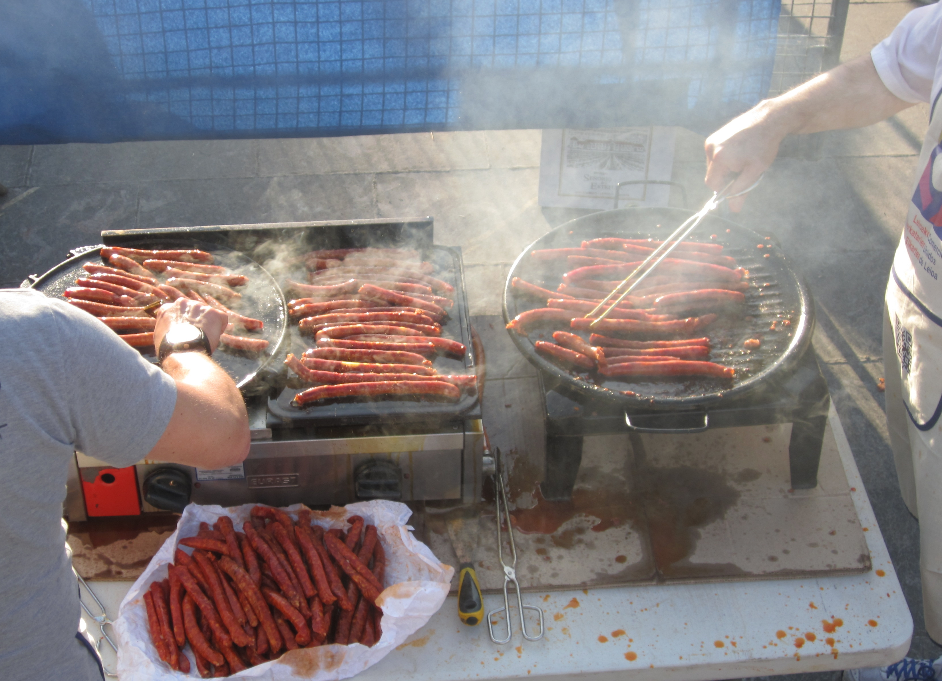 Preparación de chistorra en la festividad de San Juan, en Leioa.